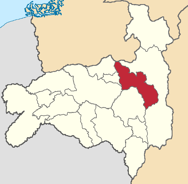 Mapa localizador del cantón en Loja, Ecuador